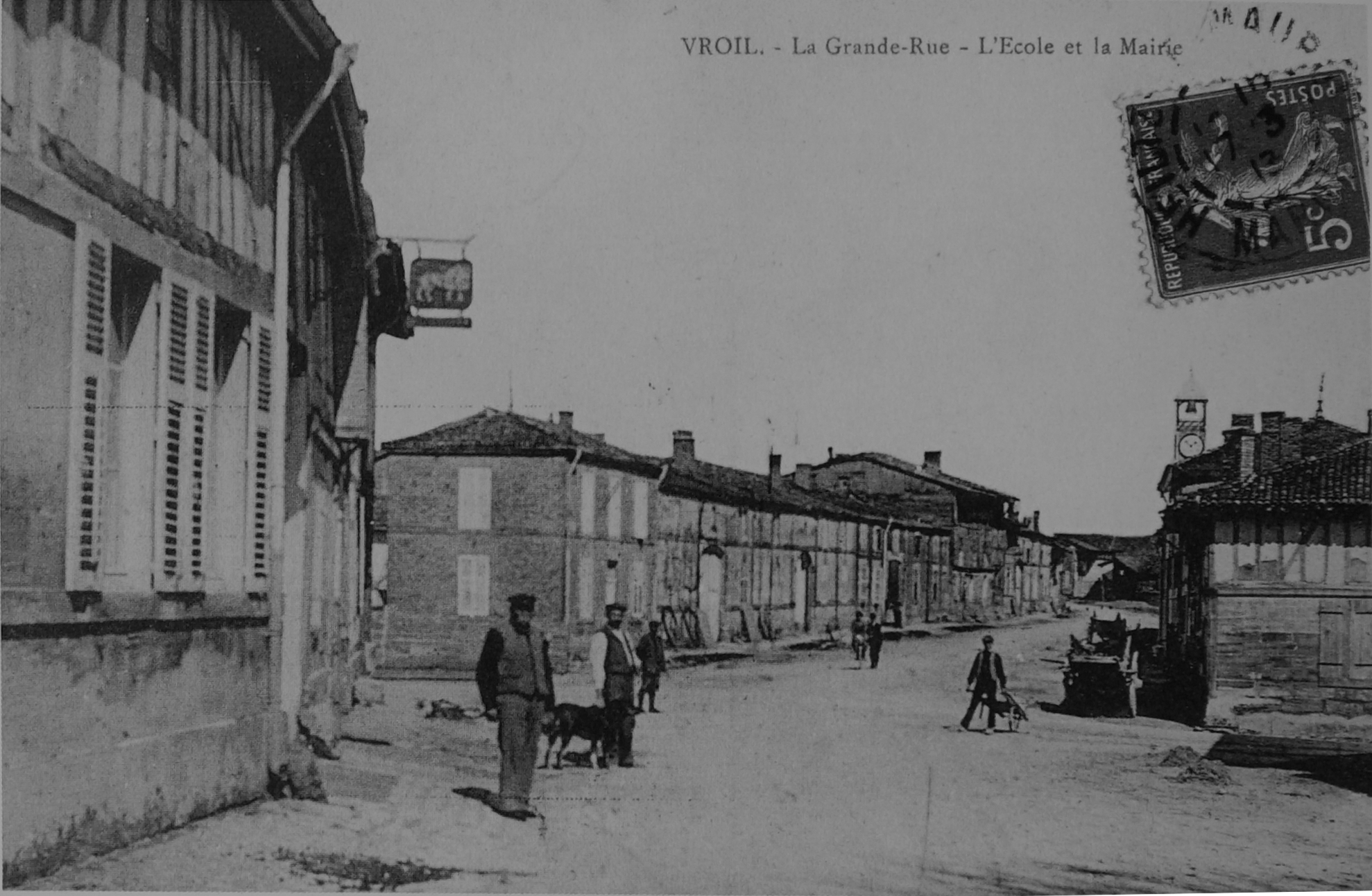 vue d'une carte postale ancienne.